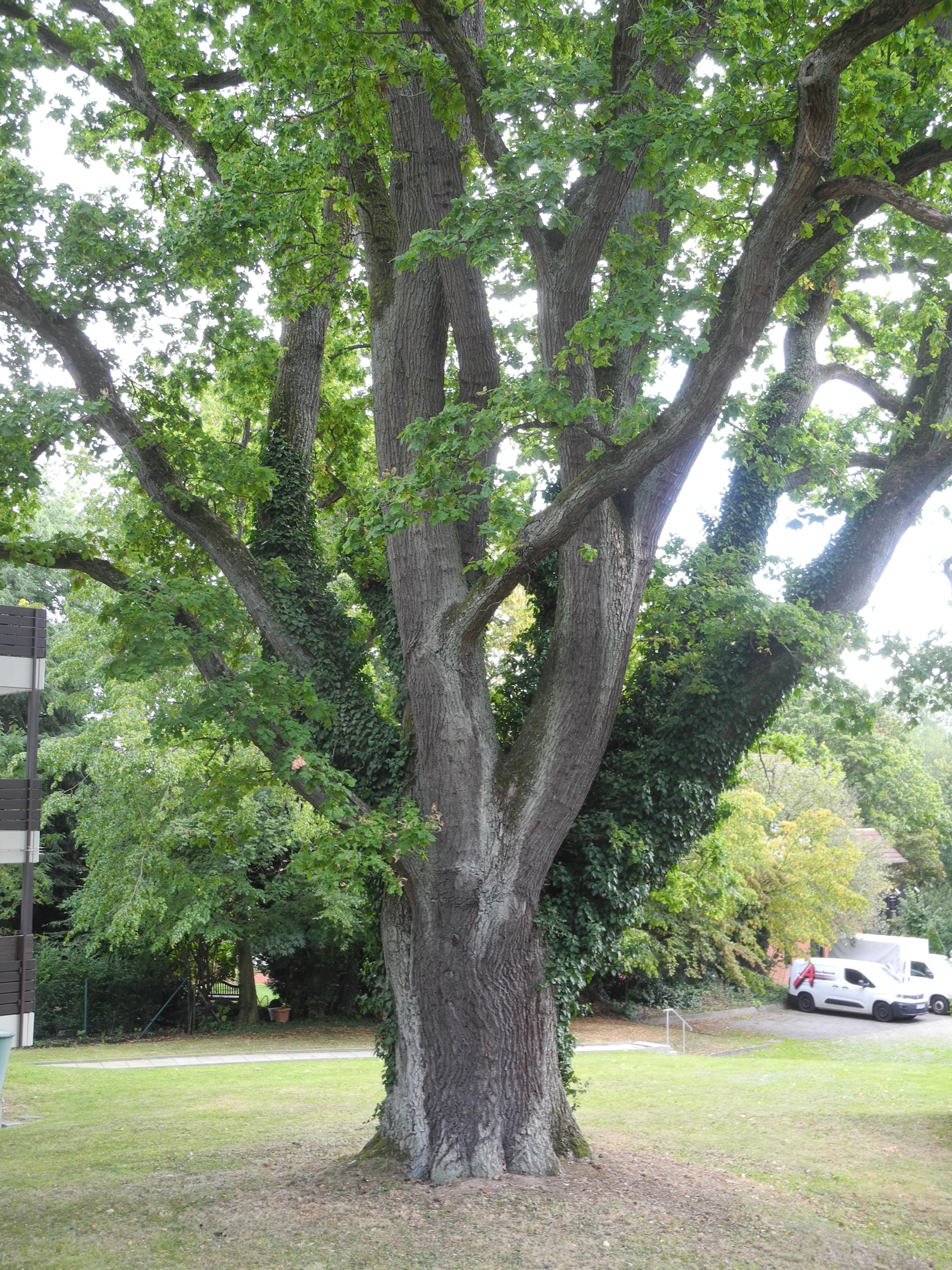 Naturdenkmal in Kassel 611.052. "1 Stieleiche" (Quercus robur) - Hugo-Preuß-Straße, Ostseite, im Garten südlich von Haus Nr. 9.